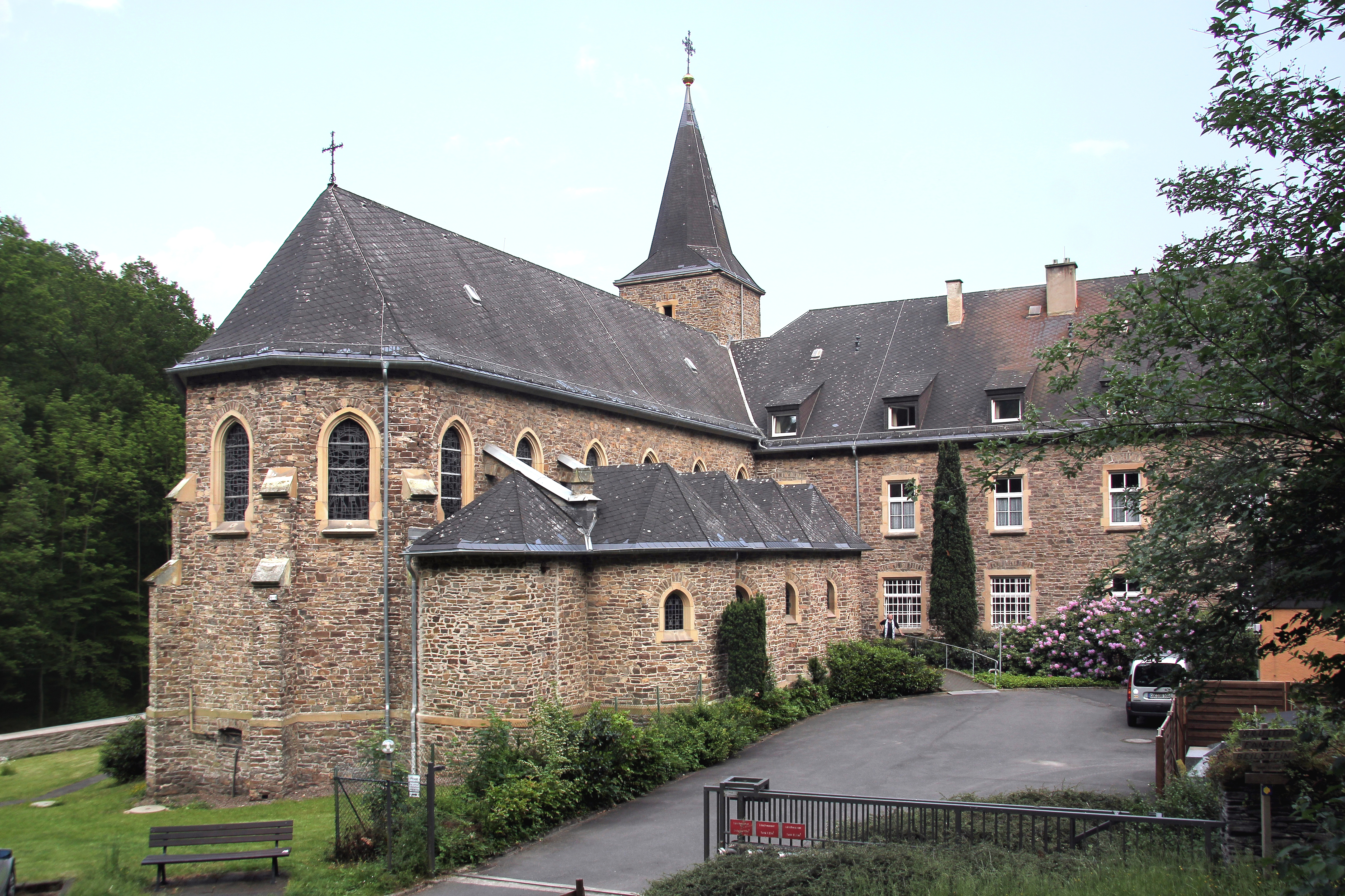 Kloster Maria Engelport im Flaumbachtal bei Treis-Karden, Nordwestseite